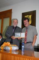 fotografia oficial festa major Bellvís 2013